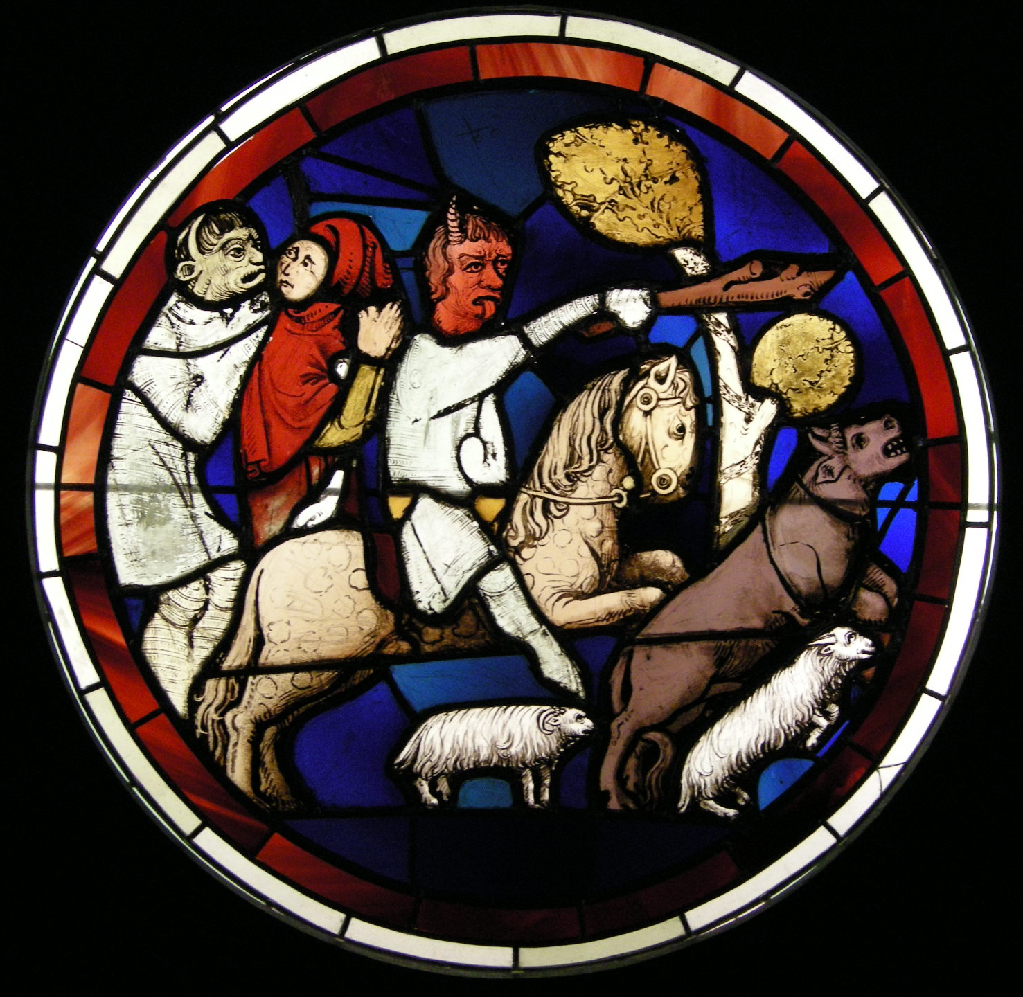 MNMA, eliminazione delle greggi di Giobbe